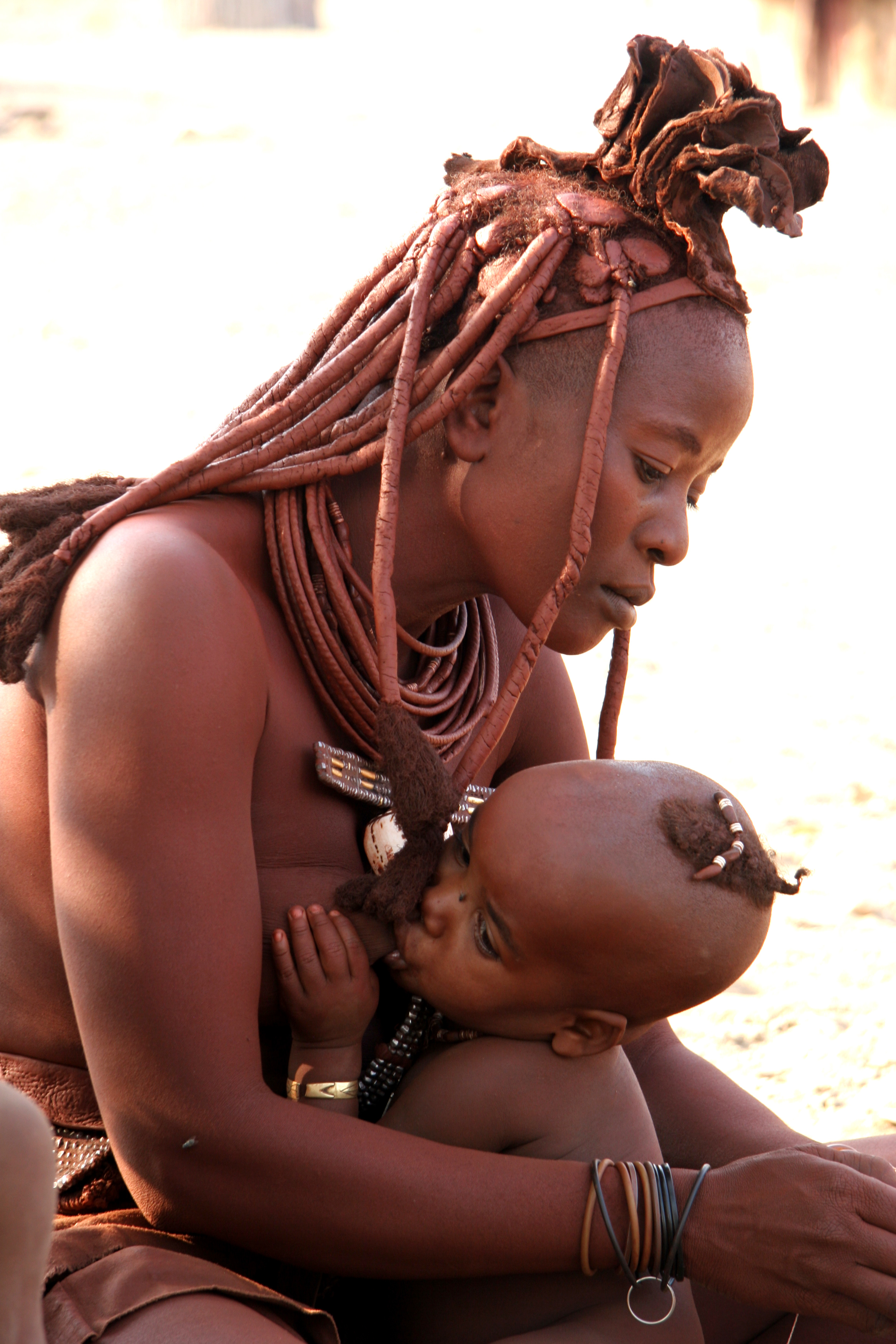 Namibie, une femme Himba et son enfant